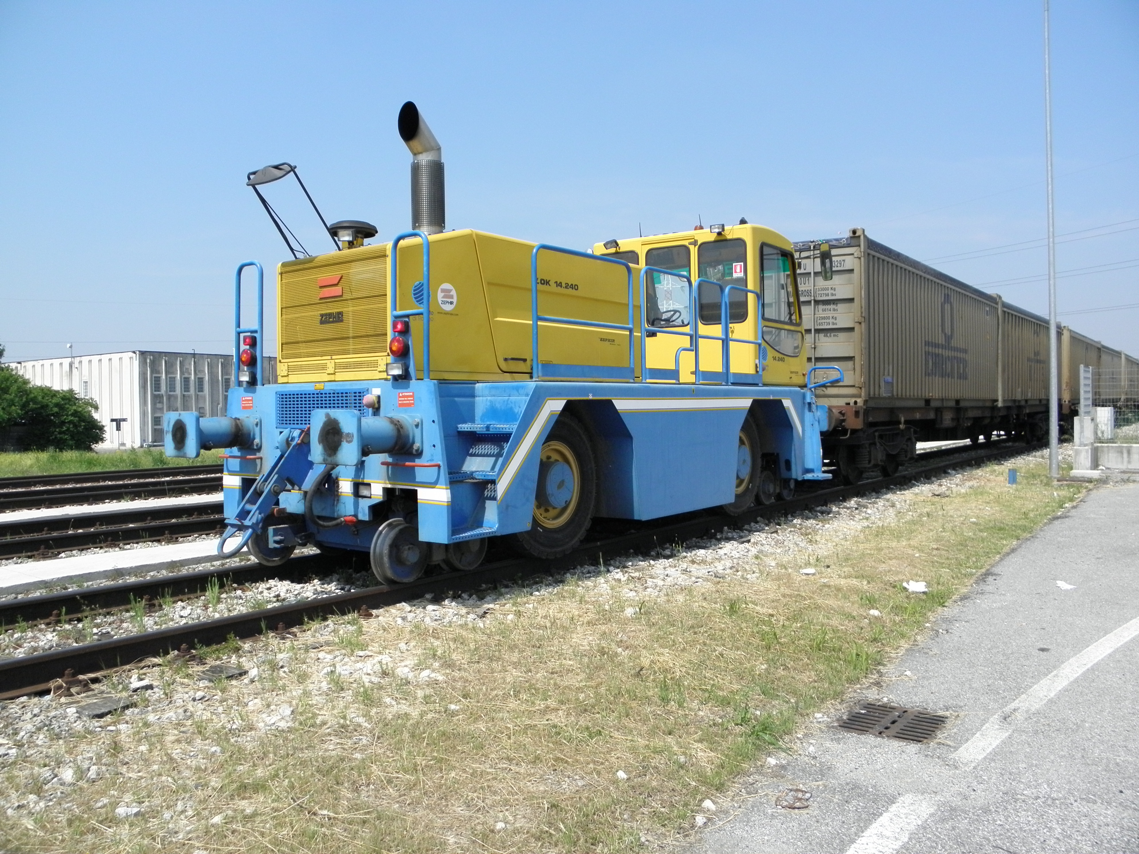 Rovigo, scalo di Rovigo Interporto: il locotrattore Zephir LOK 14.240 in testa ad un convoglio merci.